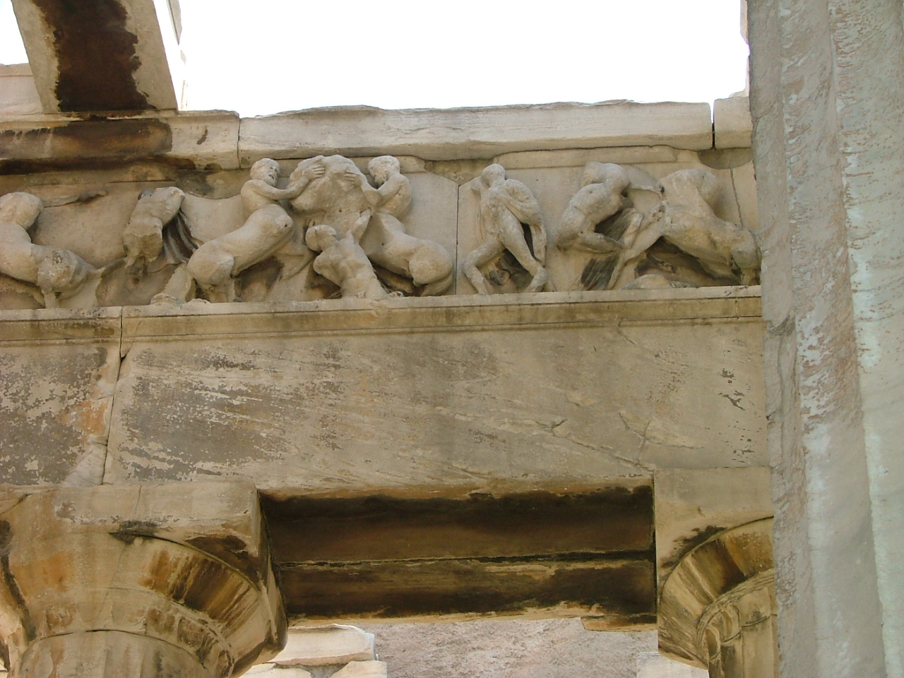 Templo de Hefesto en el Ágora de Atenas.